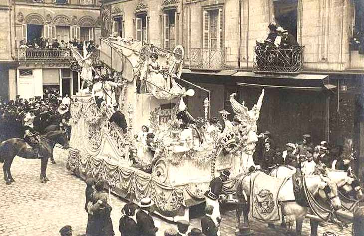 Le char de la Reine des Reines de Paris 1909 Augustine Orlhac participant à une cavalcade à Saumur le 16 mai 1909. Il est photographié à l'entrée de la rue du Marché-Noir.